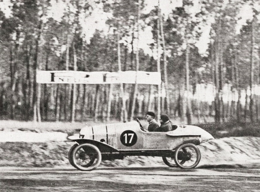 Gérard de Courcelles sur Hinstin au Grand Prix de l'U.M.F. Cyclecars 1921 - Le Sport Universel Illustré du 23 septembre 1921, p. 1098